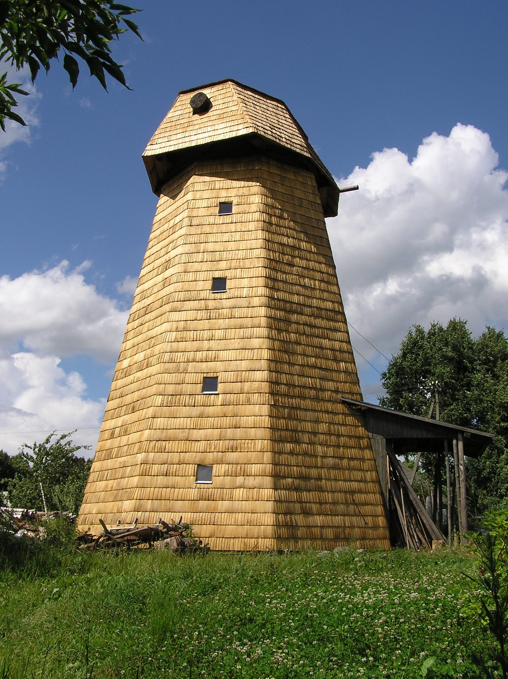 Viimased 50 aastat jahvatati elektrijõul töötavate kividega, kuid mõned tuuliku seadmed ja kivi on säilinud.